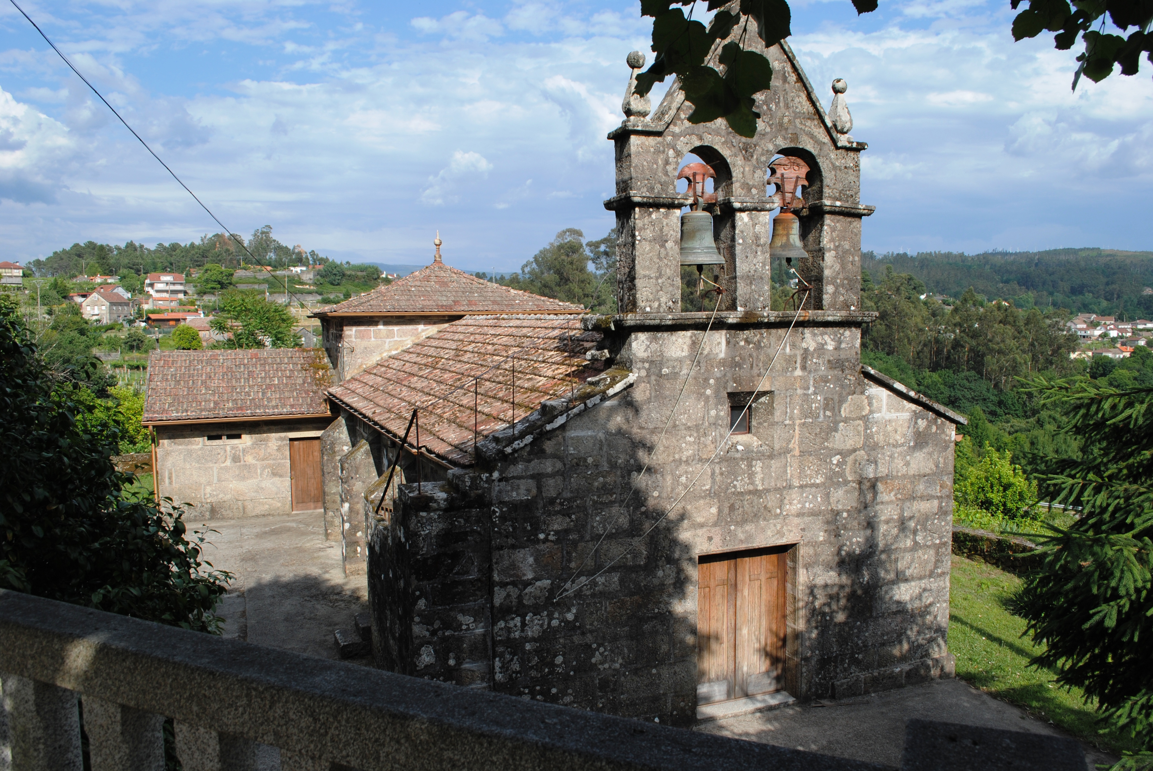 Igrexa parroquial de San Martiño de Vilasobroso, Mondariz.